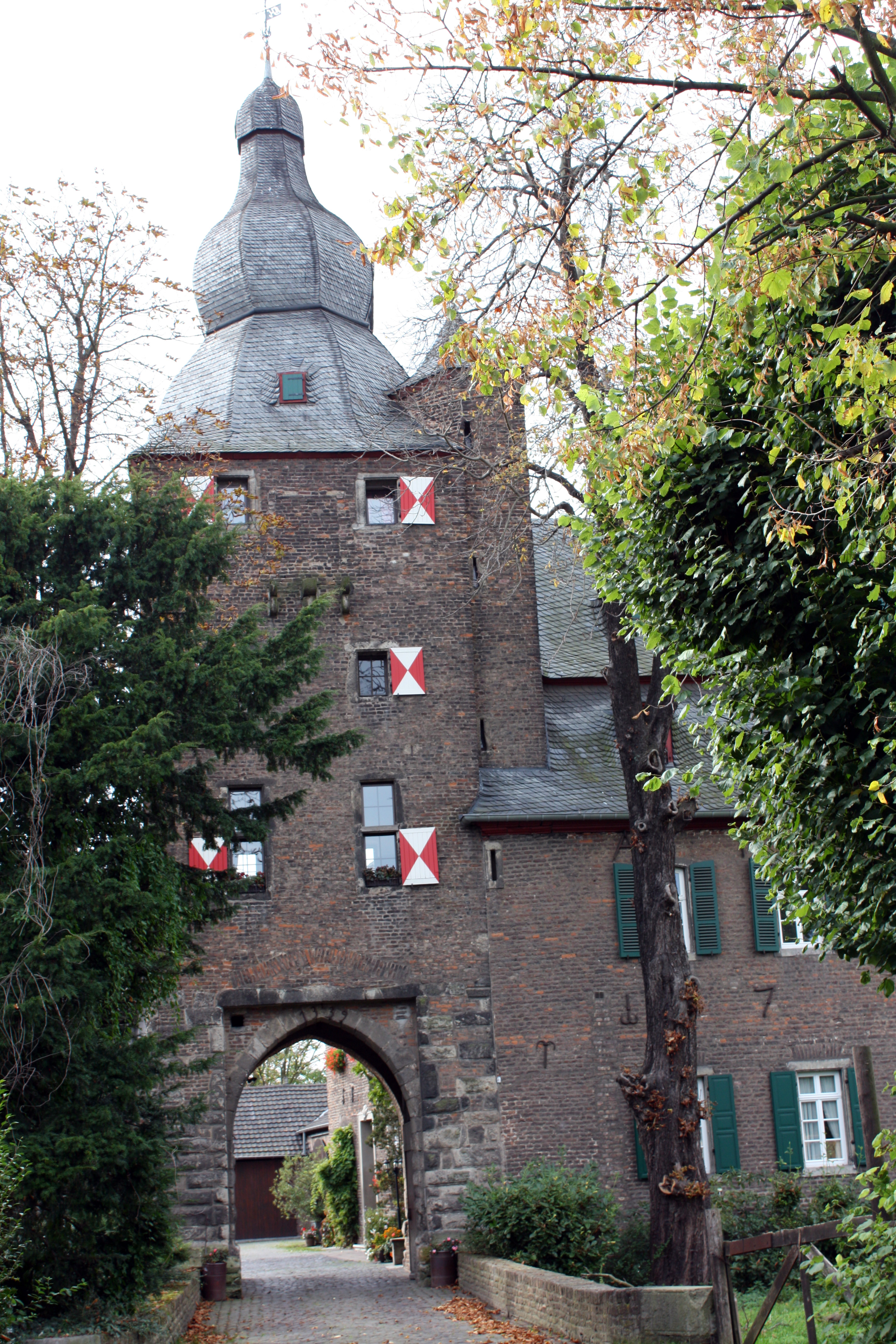 Burg Efferen, Zugang